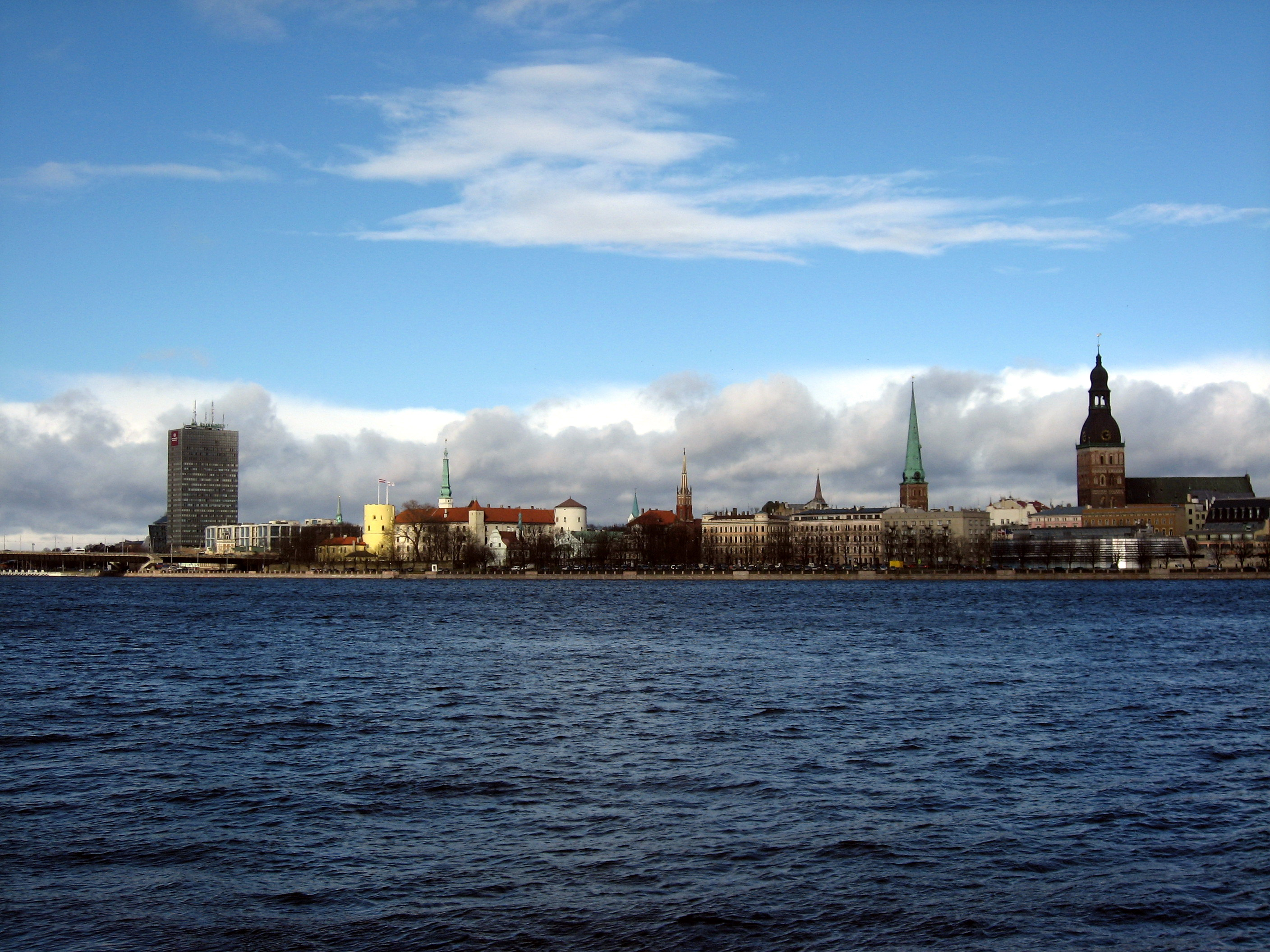 Daugava a Stará Riga